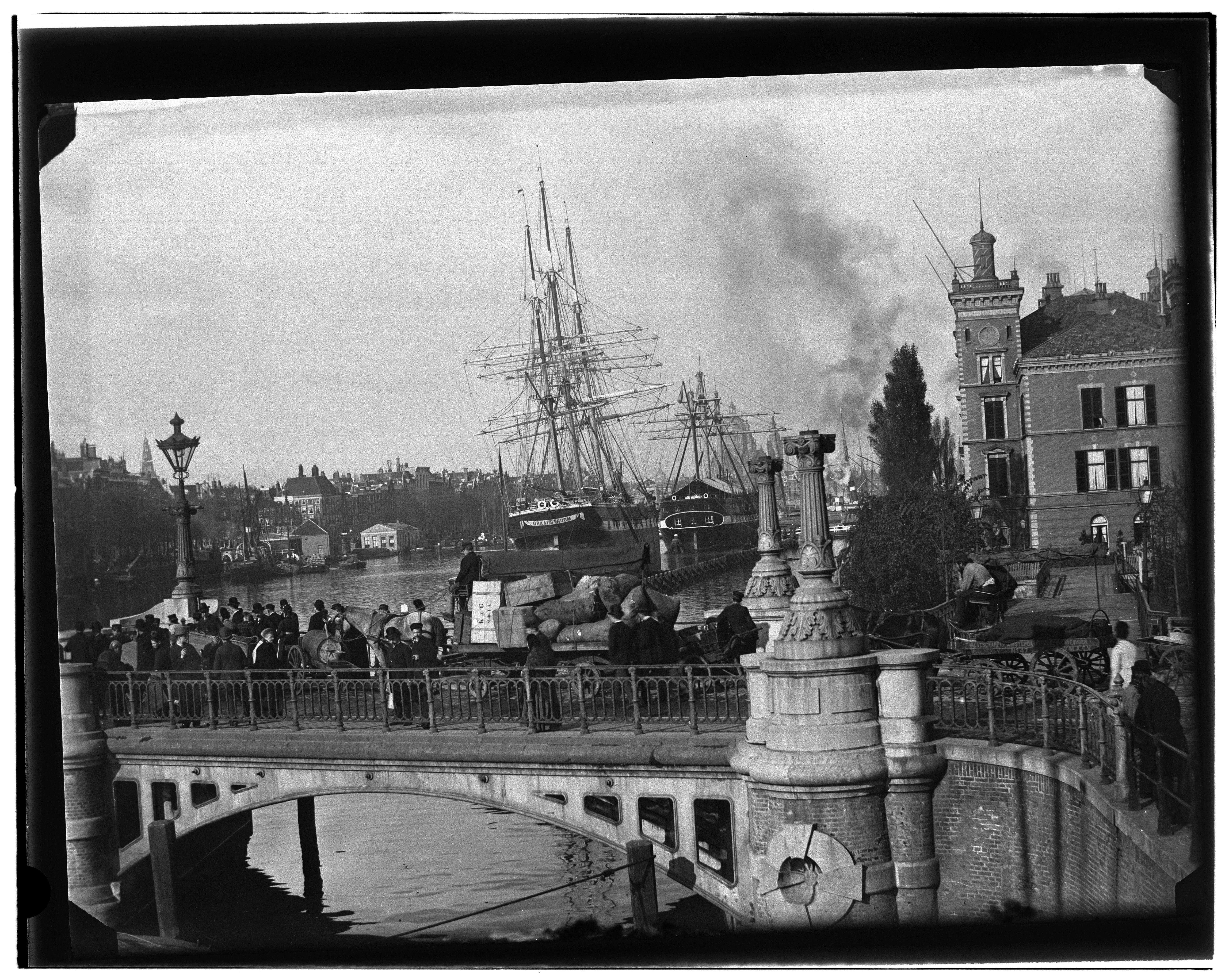 Beschrijving Nieuwevaart Kattenburgerbrug (brug nr. 274). Gezien in westelijke richting vanuit deoverslagloods van de HIJSM naar Prins Hendrikkade (links). Voor de palenrij vanhet Marine-Etablissement liggen de Graafstroom (links) en het opleidingsschipde Wassen Documenttype foto Vervaardiger Olie``, Jacob (1834-1905) Collectie Collectie Jacob Olie Jbz. Datering 1890 Geografische naam Nieuwevaart Inventarissen Afbeeldingsbestand 10019A000381 Generated with Dememorixer